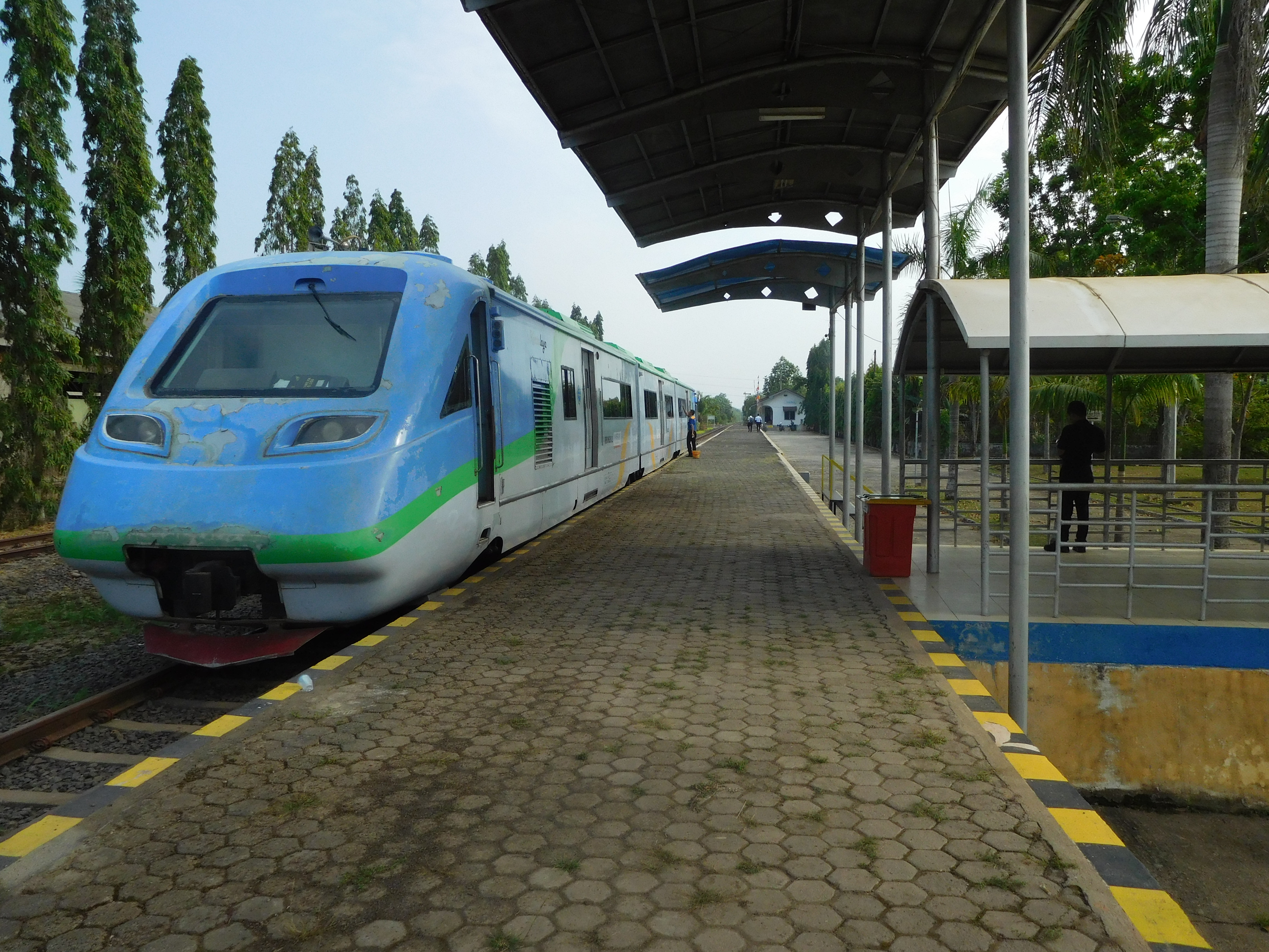 Peron Stasiun Indralaya dengan KA Kertalaya